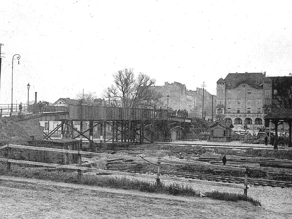 Bahnhofsbrücke Eberswalde vor 1900